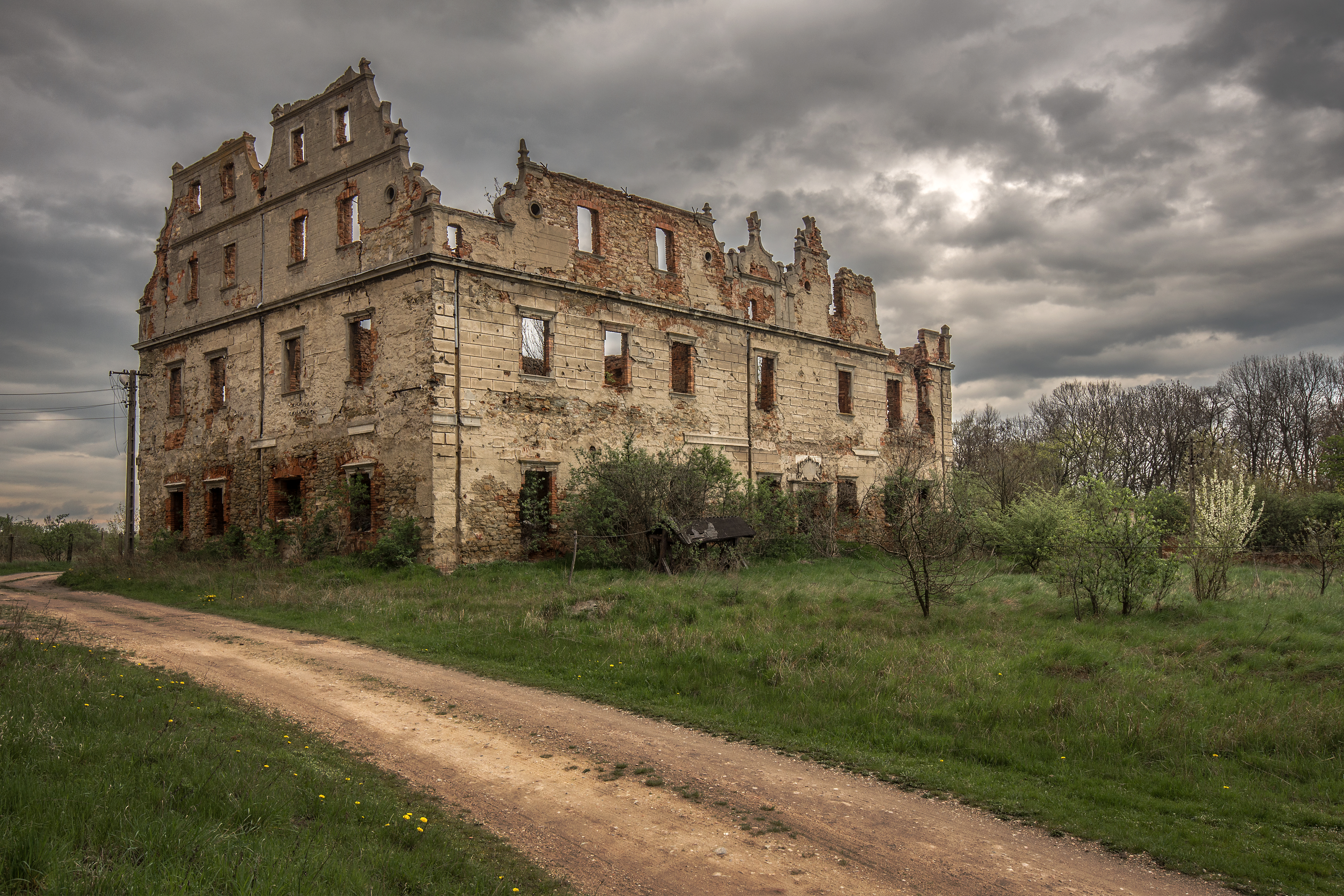 Borzygniew, pałac, XVII